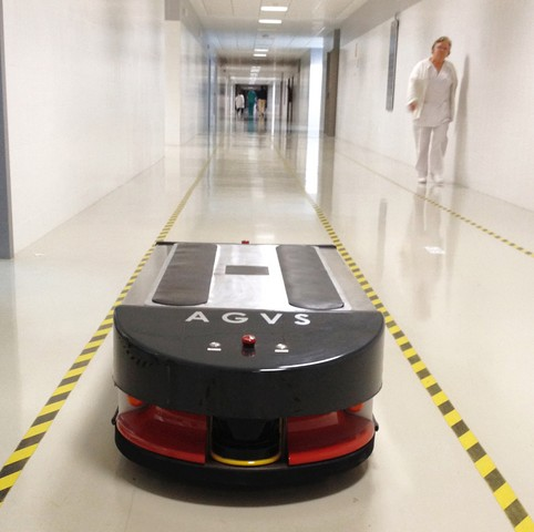 Robot tipo AGVS desarrollado por la empresa Robotnik operando en el Hospital La Fe de Valencia